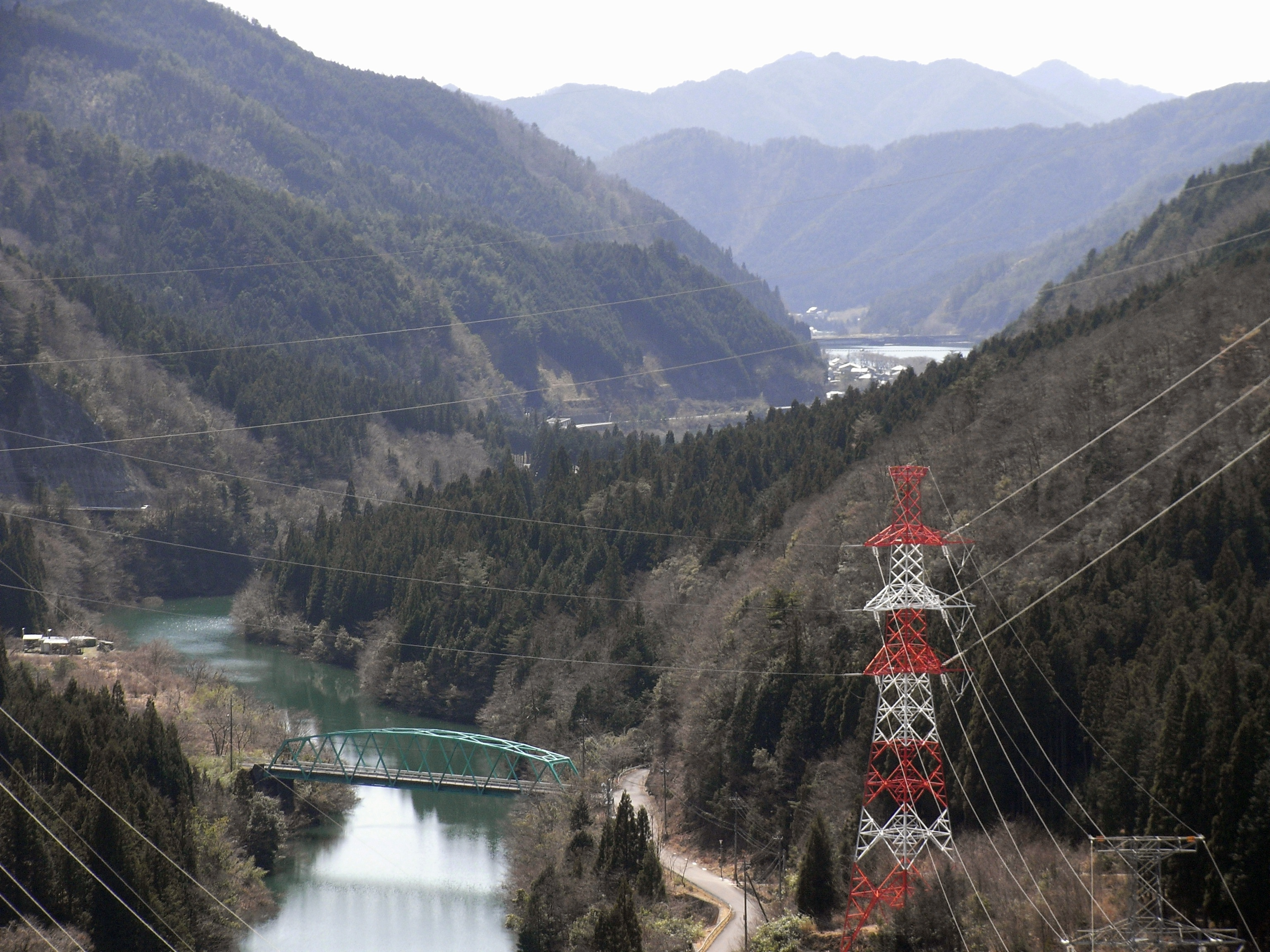 Lake